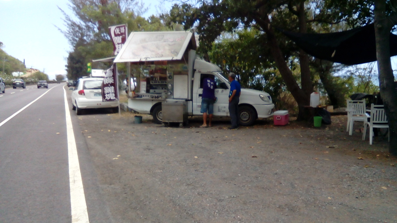 屏東縣枋山鄉台一線屏鵝公路，「三個傻瓜」簡餐店周遭一帶，可觀賞海景的三菱Freeca咖啡車。